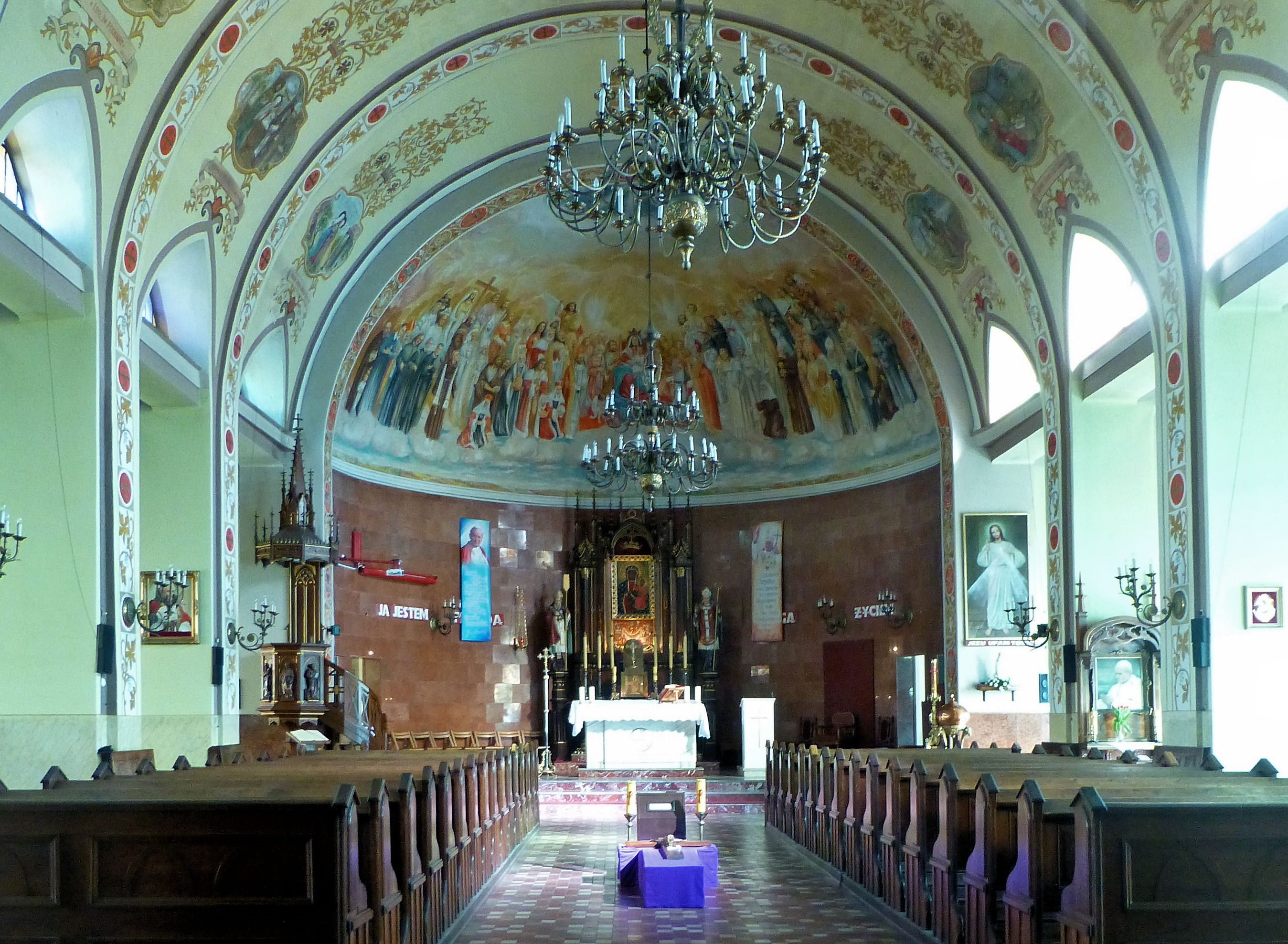 Obecna nawa główna